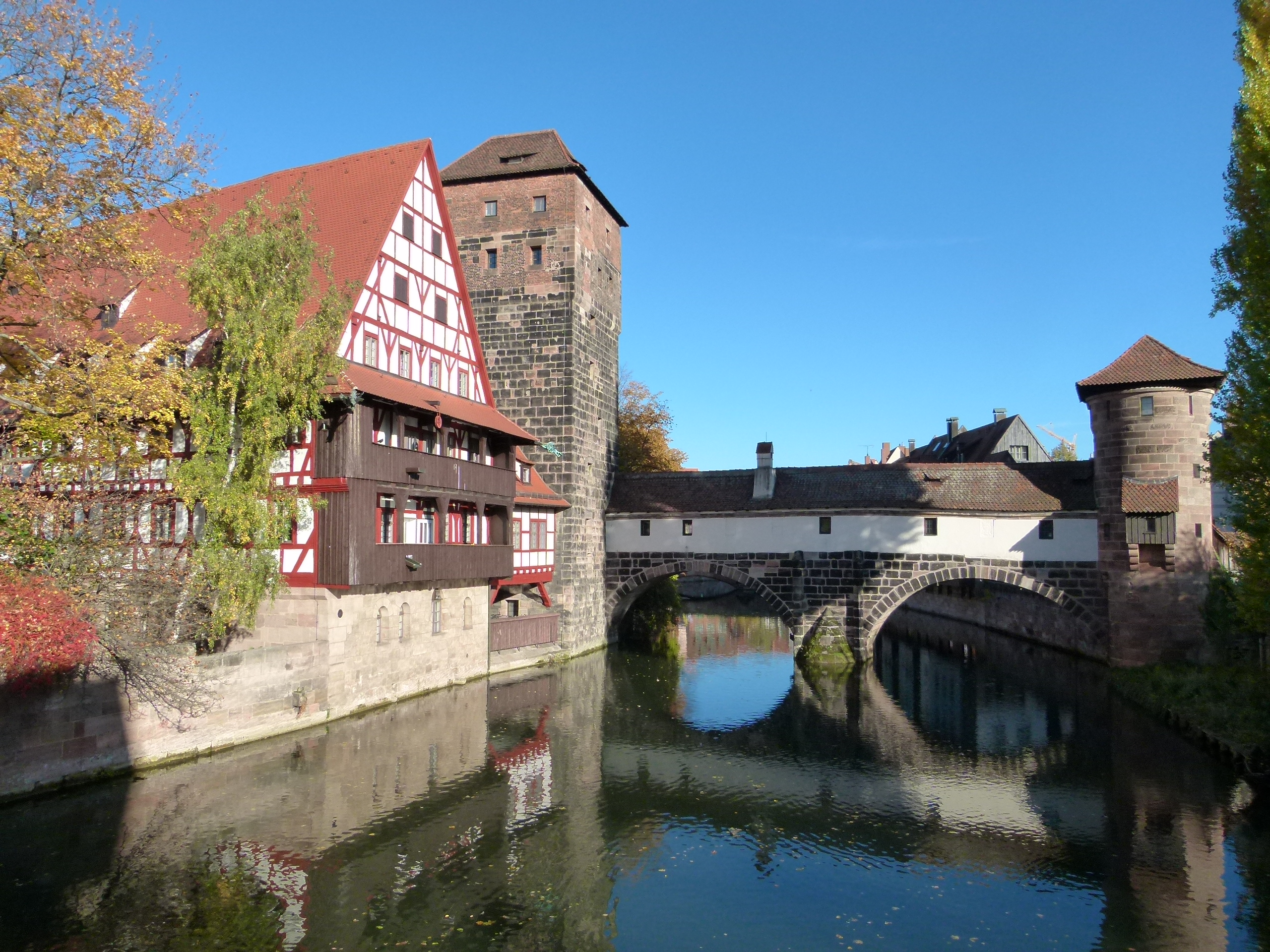 Henkersteg in Nürnberg